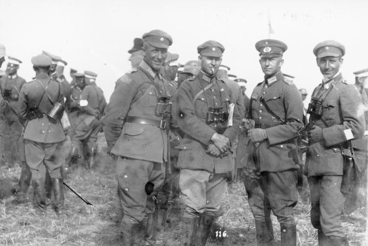 Süddeutschland, Manöver der 5. und 7. Division Gruppenmanöver der 5. und 7. Division in Bayern, Württemberg und Baden 1926. Zweiter von rechts der damalige Hauptmann Alfred Jodl, später als General im Führerhauptquartier. Links neben ihm (mit Zigarette) sein Bruder Ferdinand Jodl. Beide waren Offiz Abgebildete Personen: Jodl, Alfred: Generaloberst, Ritterkreuz (RK), Heer, Nürnberger Prozeß, hingerichtet 1946, Deutschland (GND 118557602) Jodl, Ferdinand: Generalleutnant, Ritterkreuz (RK), Heer, Deutschland